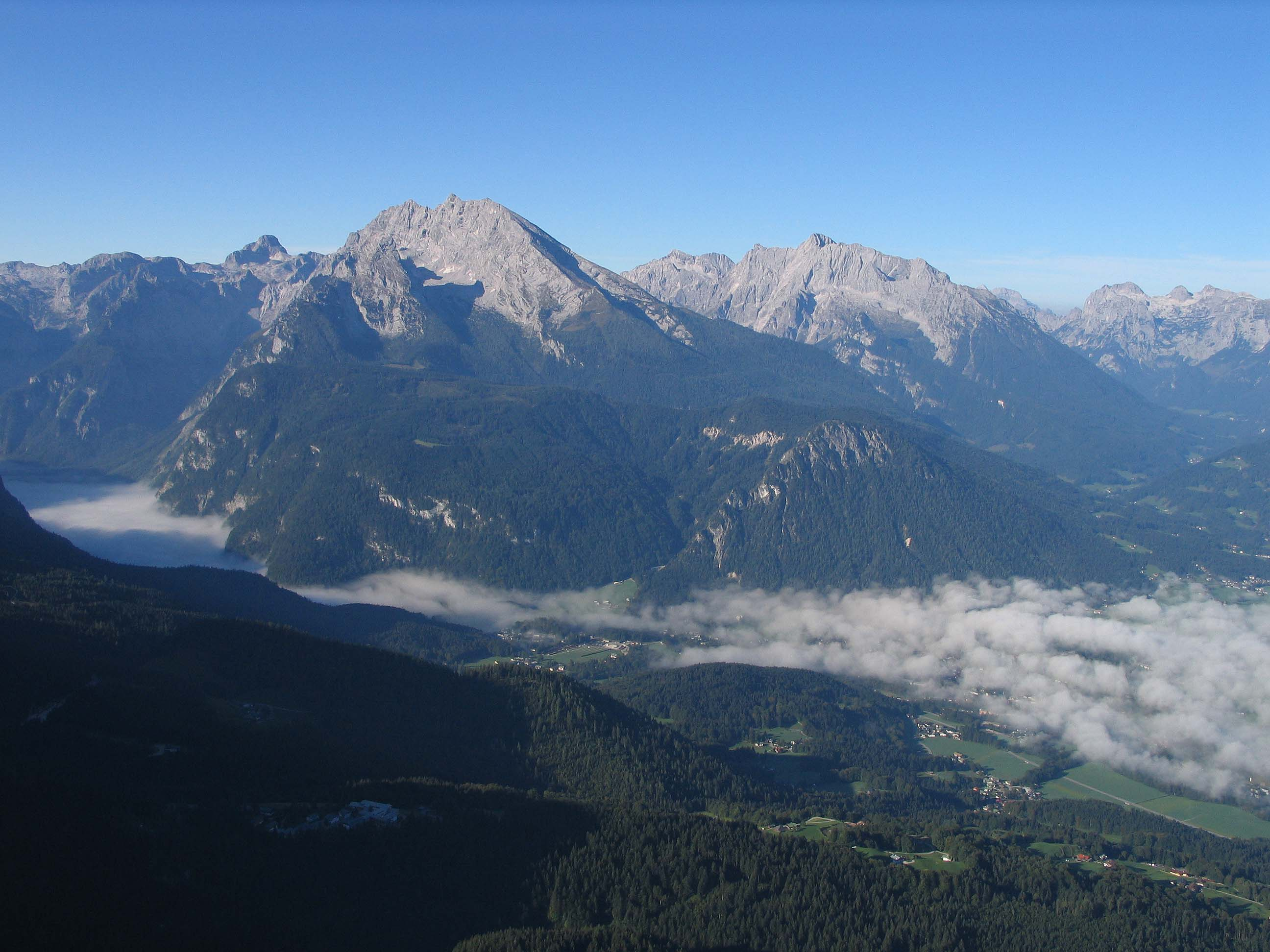 Blick vom Kehlsteinhaus auf Watzmann und Hochkalter, Berchtesgadener Alpen Photographer: Luidger (23. September 2006)